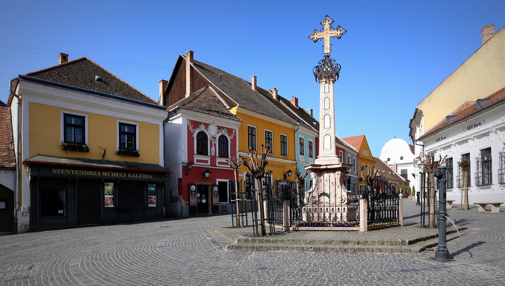 Szentendre, Főtér